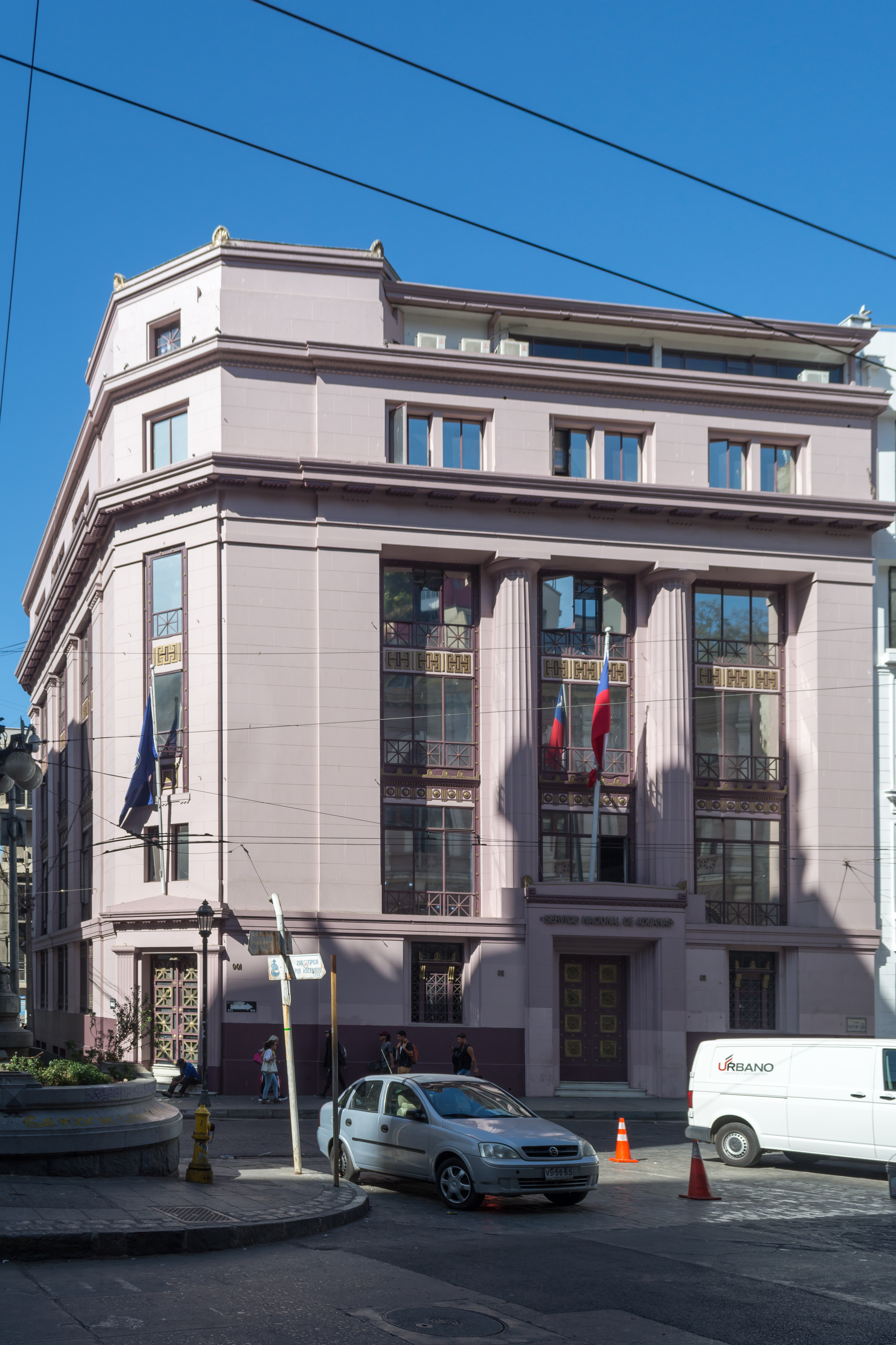 Edificio del Servicio Nacional de Aduanas, Valparaíso, Región de Valparaíso, Chile